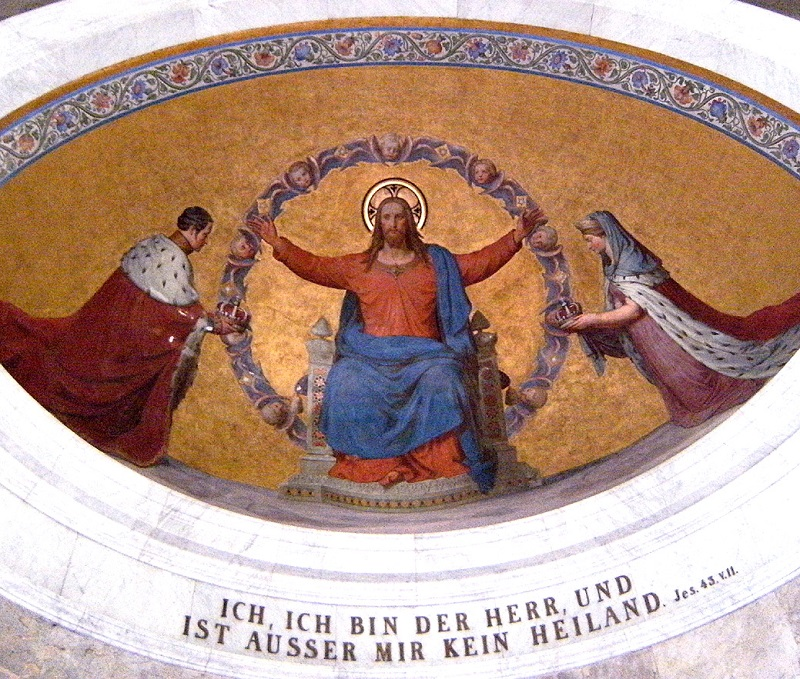 Mausoleum Schloss Charlottenburg (Königin Luise, König Freidrich Wilhelm III), Apsis - Fresko von Carl Gottfried Pfannschmidt, Foto L. Wekenborg